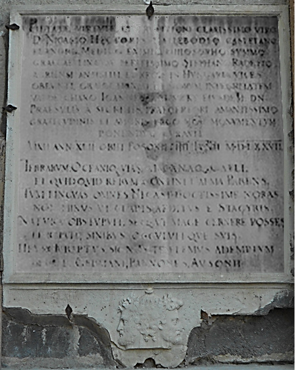 Monument Ellebodius Bratislava